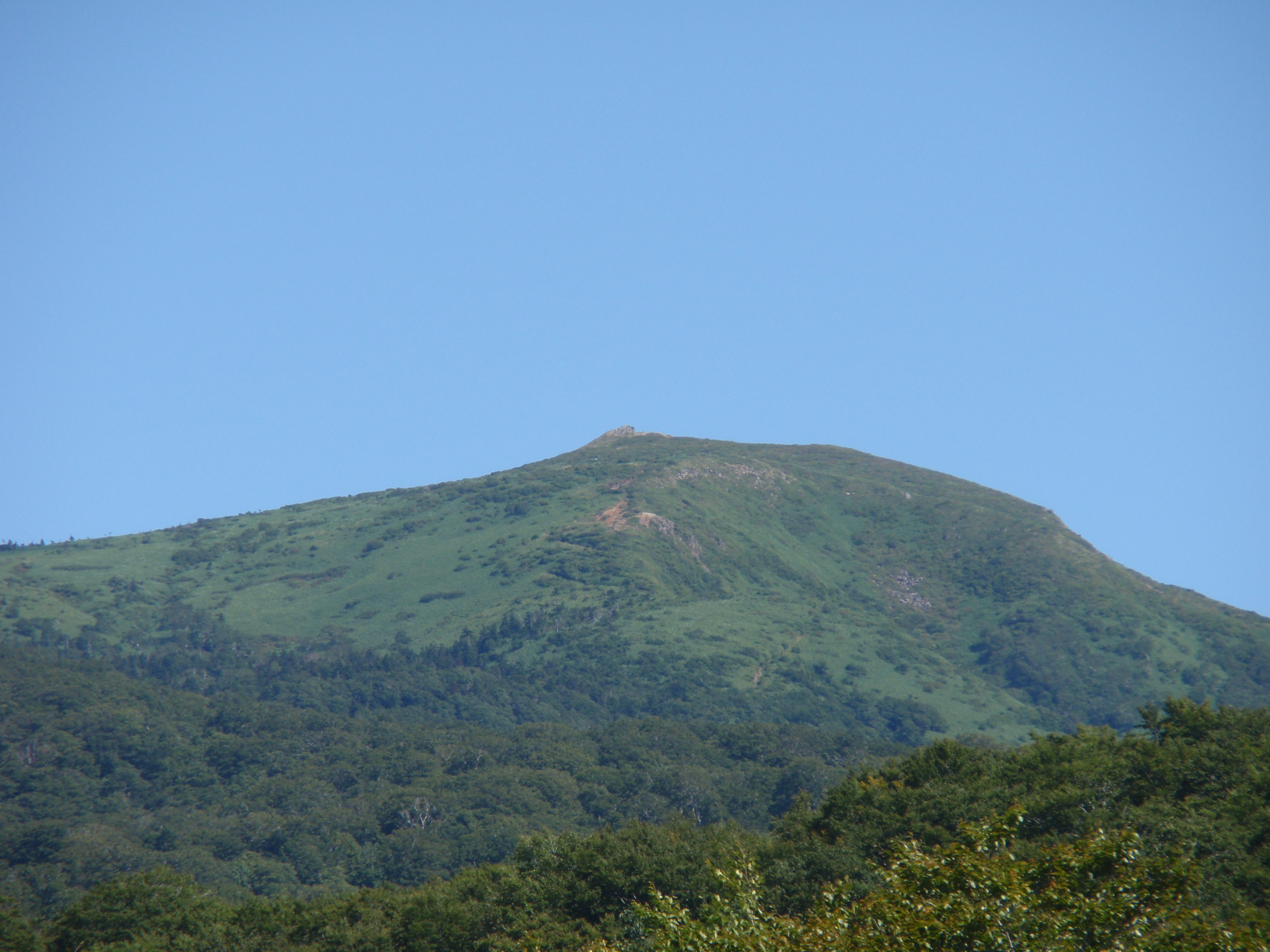 秋田県乳頭温泉郷から見る乳頭山